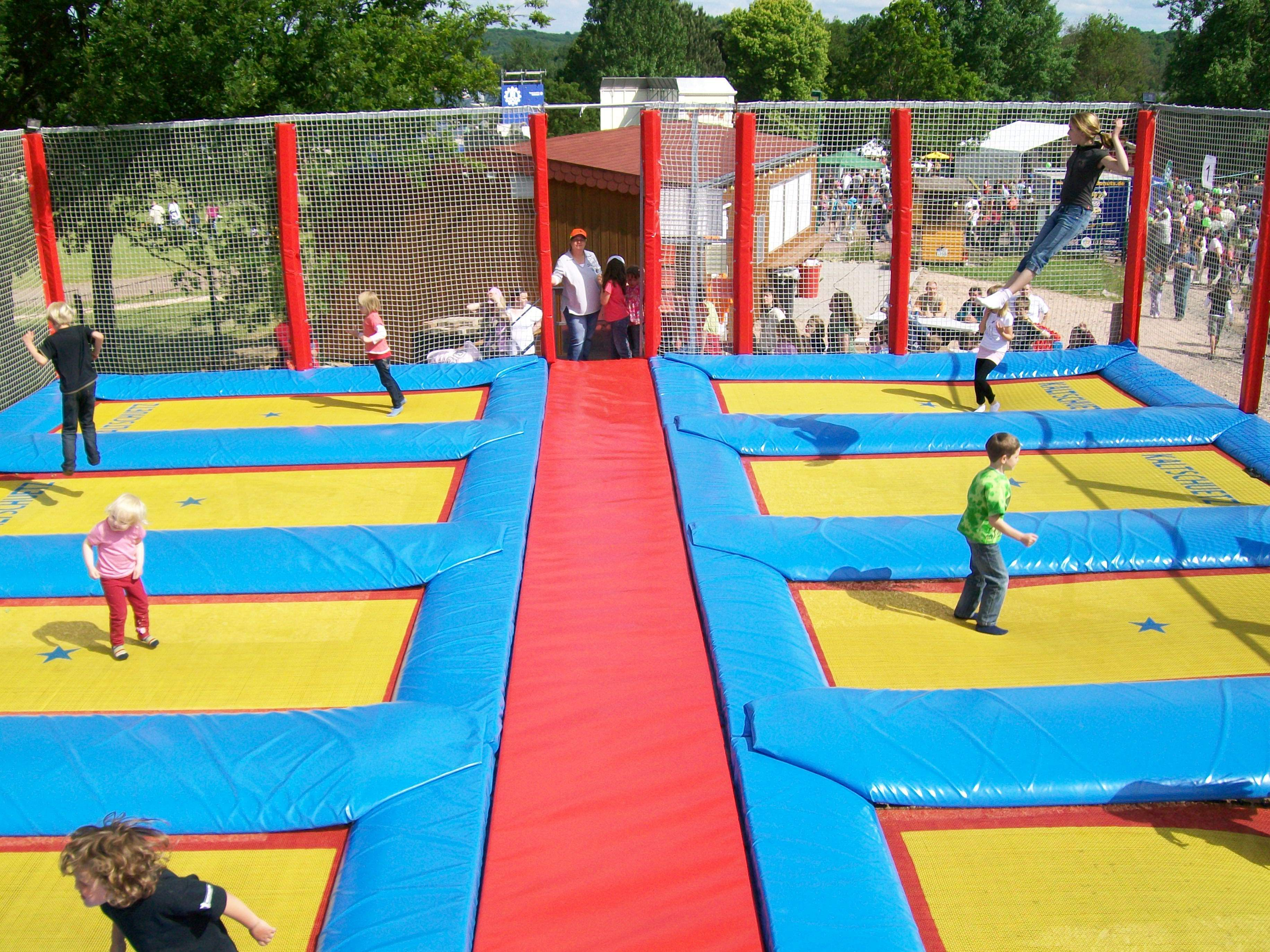 Das Tramposaarium - die größte Outdoor-Trampolinanlage im Südwesten, Bostalsee, Saarland